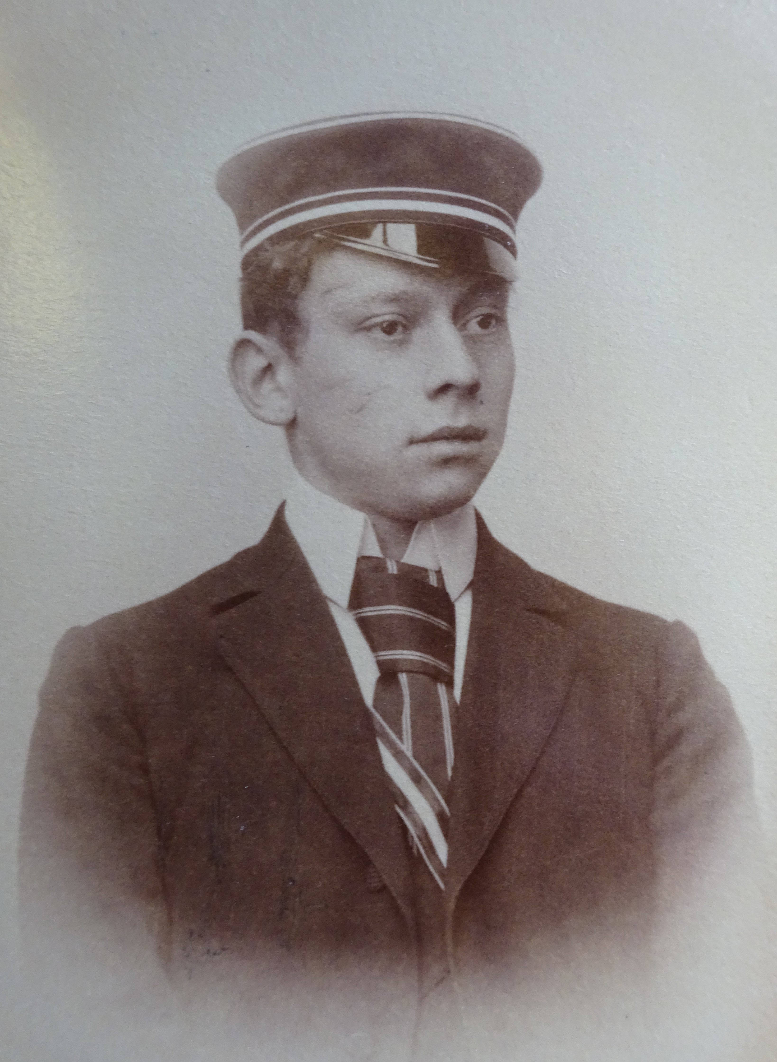 Porträtfotografie des Tübinger Jurastudenten Oscar Stübben